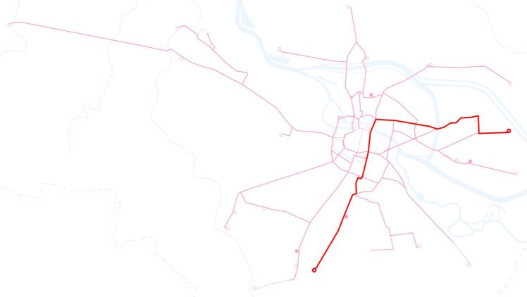 Poglądowa mapka przebiegu linii tramwajowej 9 we Wrocławiu.